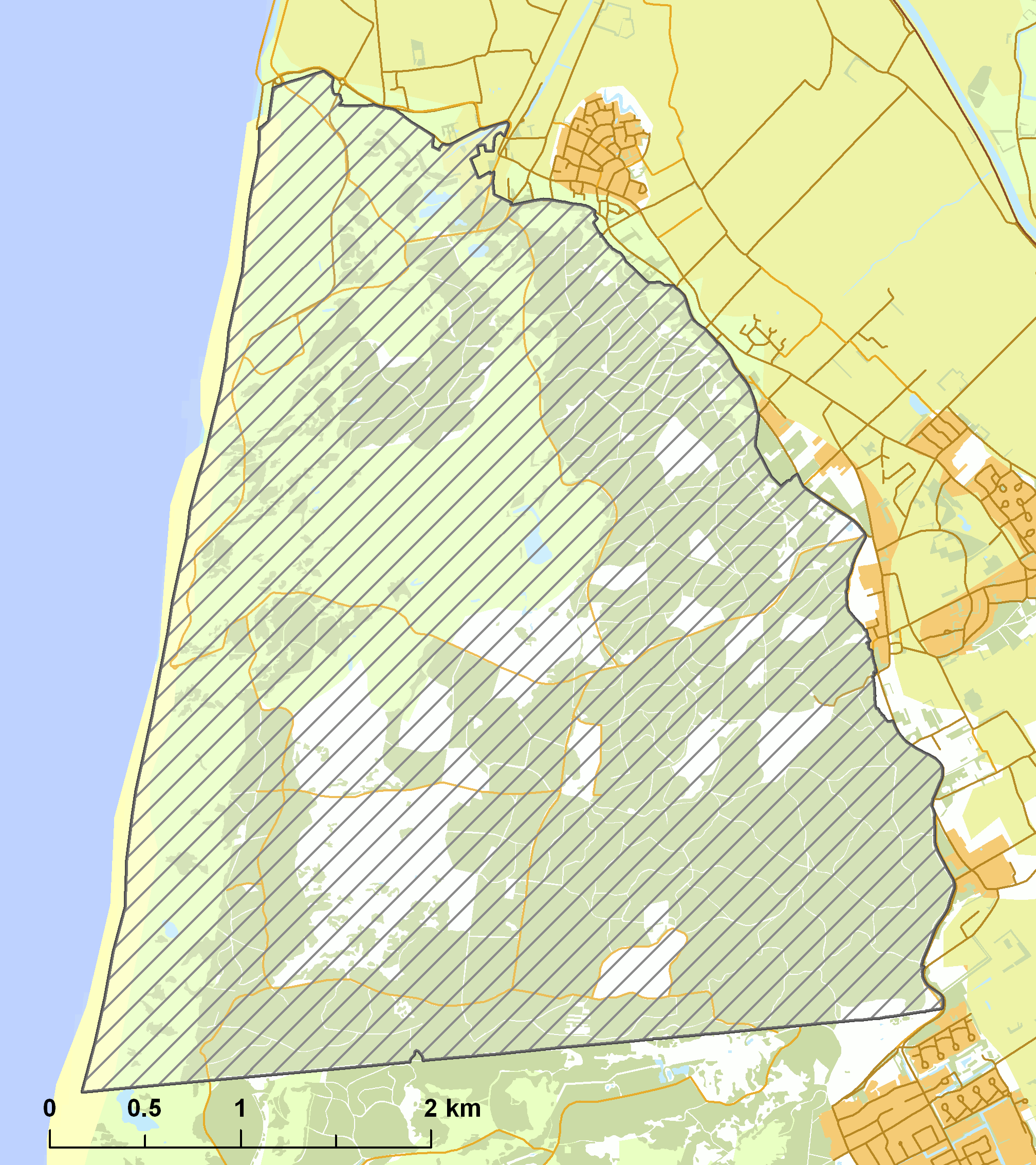 Natura2000 - Schoorlse Duinen.png